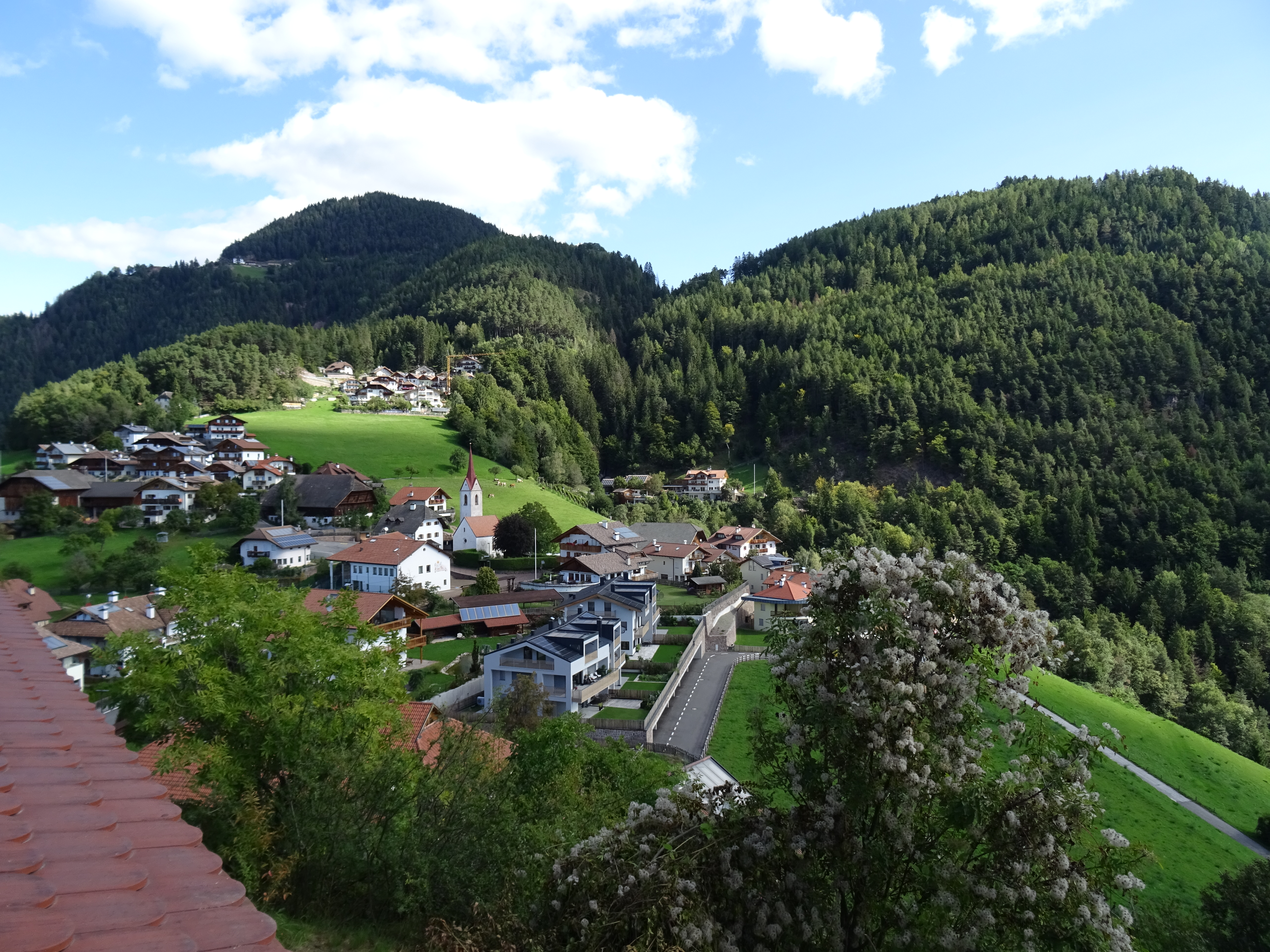 baba Vanga, a Bulgarian prophetess.